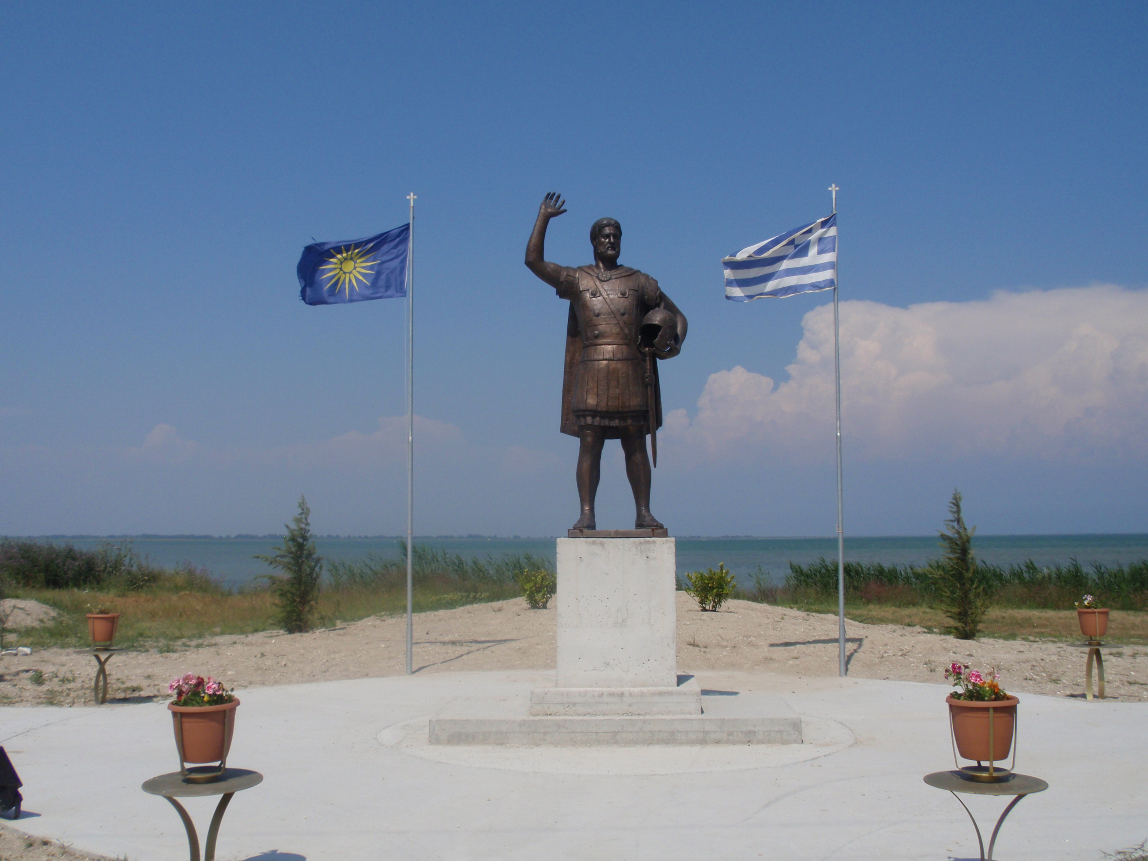 Φίλιππος ΙΙ βασ. Μακεδόνων